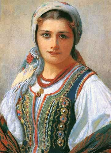 Piękna Zośka